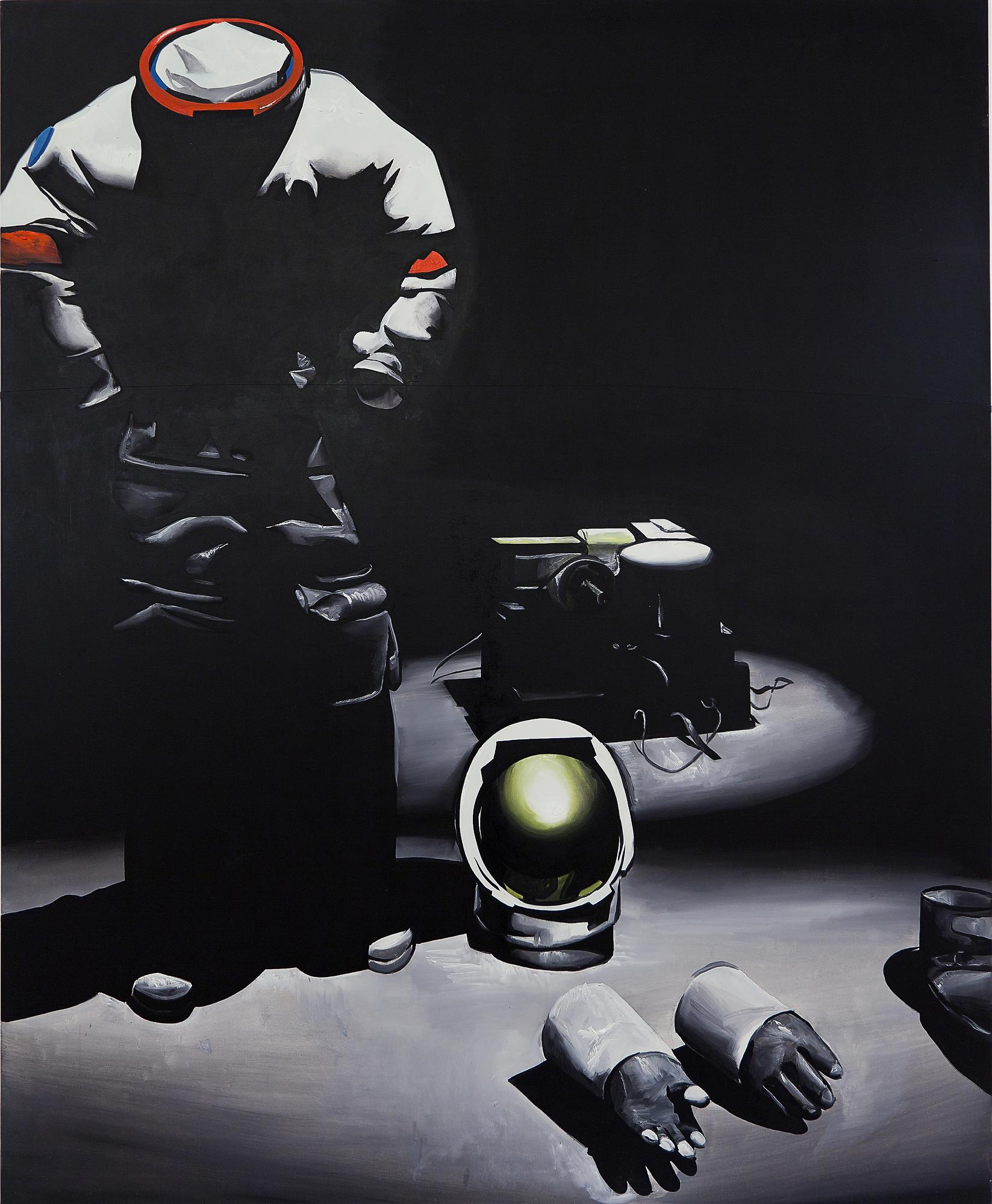 Wilhelm Sasnal, malarz i autor filmów, należy do grona najbardziej cenionych dziś na świecie artystów, a jego płótna znajdują się w zbiorach wielu prestiżowych muzeów i kolekcji prywatnych, między innymi nowojorskiej MoMA, Centre Pompidou w Paryżu i Tate Modern w Londynie. Bez tytułu (Astronauta) to jedno z najnowszych dzieł artysty, który konsekwentnie w swej twórczości malarskiej zajmuje się interpretowaniem i przetwarzaniem wszechobecnych we współczesnym świecie fotografii. Obraz przedstawia skafander amerykańskiego astronauty wystawiony jako eksponat muzealny w Narodowym Muzeum Lotnictwa i Przestrzeni Kosmicznej Smithsonian Institution w Waszyngtonie.